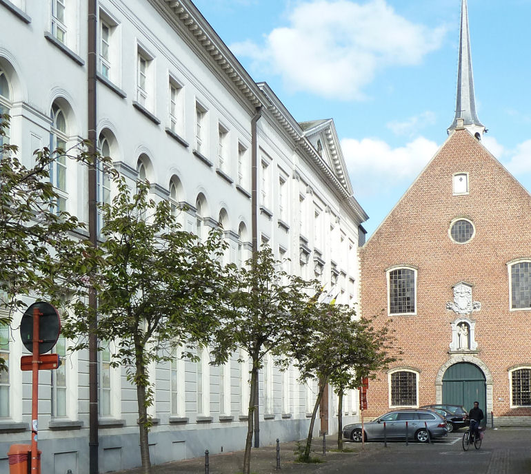 Sint-Jozef-Klein-Seminarie (Saint Joseph Minor Seminary) in Sint-Niklaas. Sint-Niklaas, East Flanders, Belgium